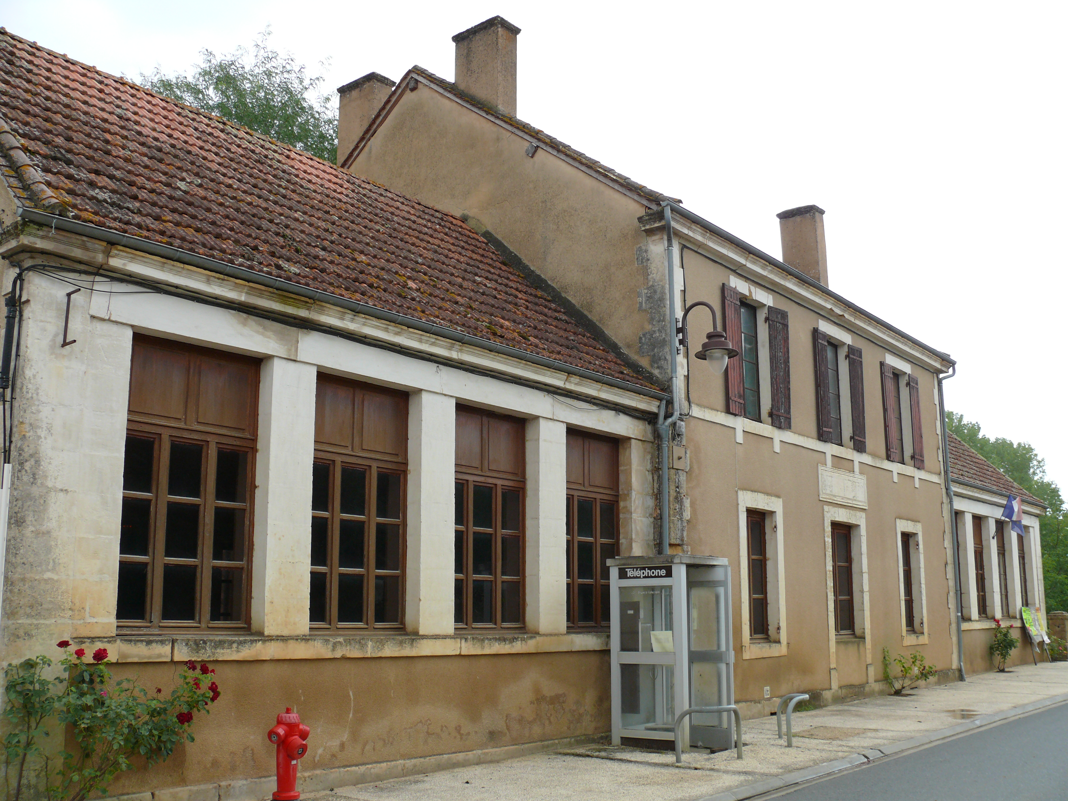 Grives - Ecole-Mairie